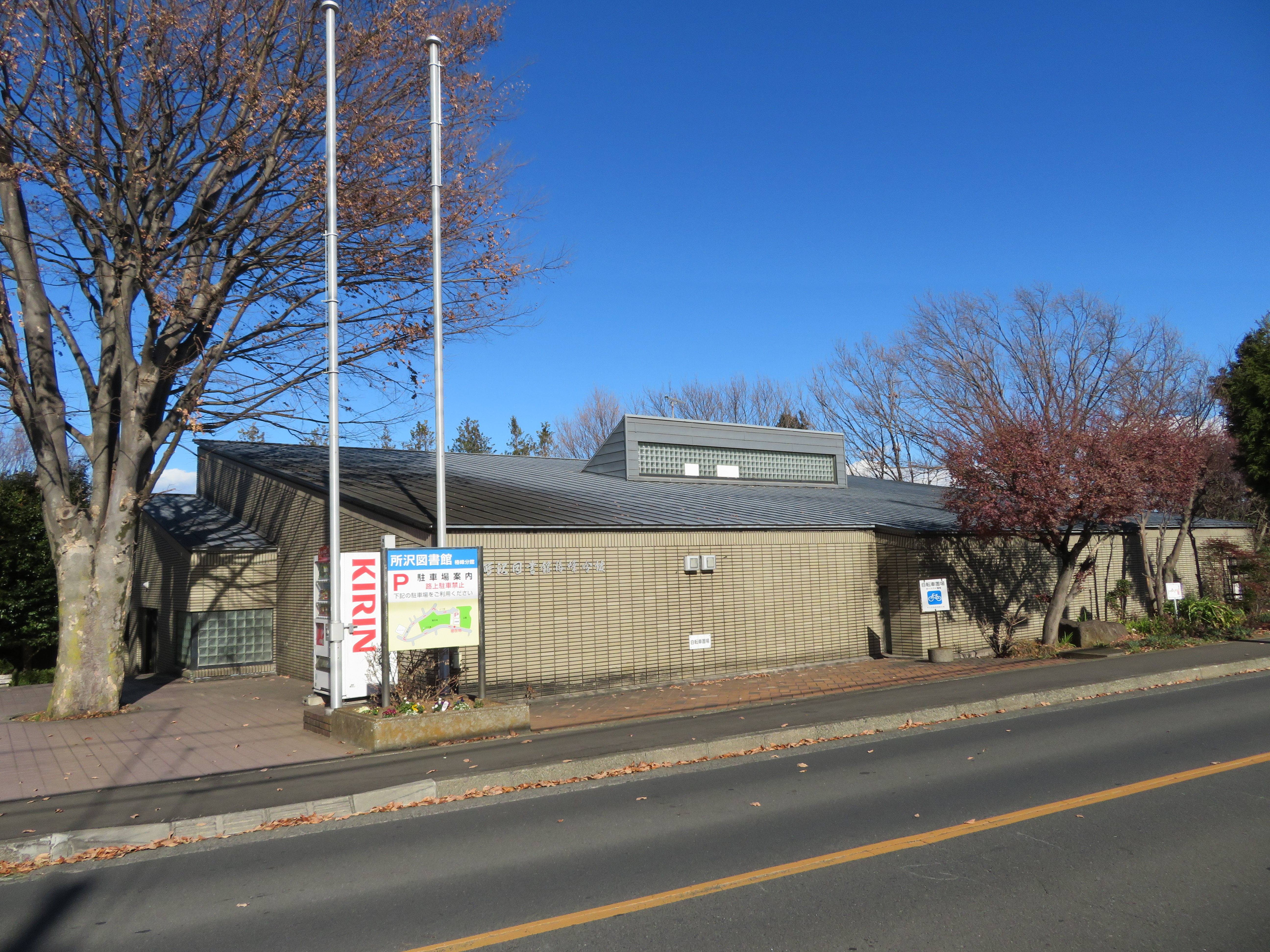 埼玉県所沢市に所在する所沢市立所沢図書館椿峰分館 Canon PowerShot SX720 HS